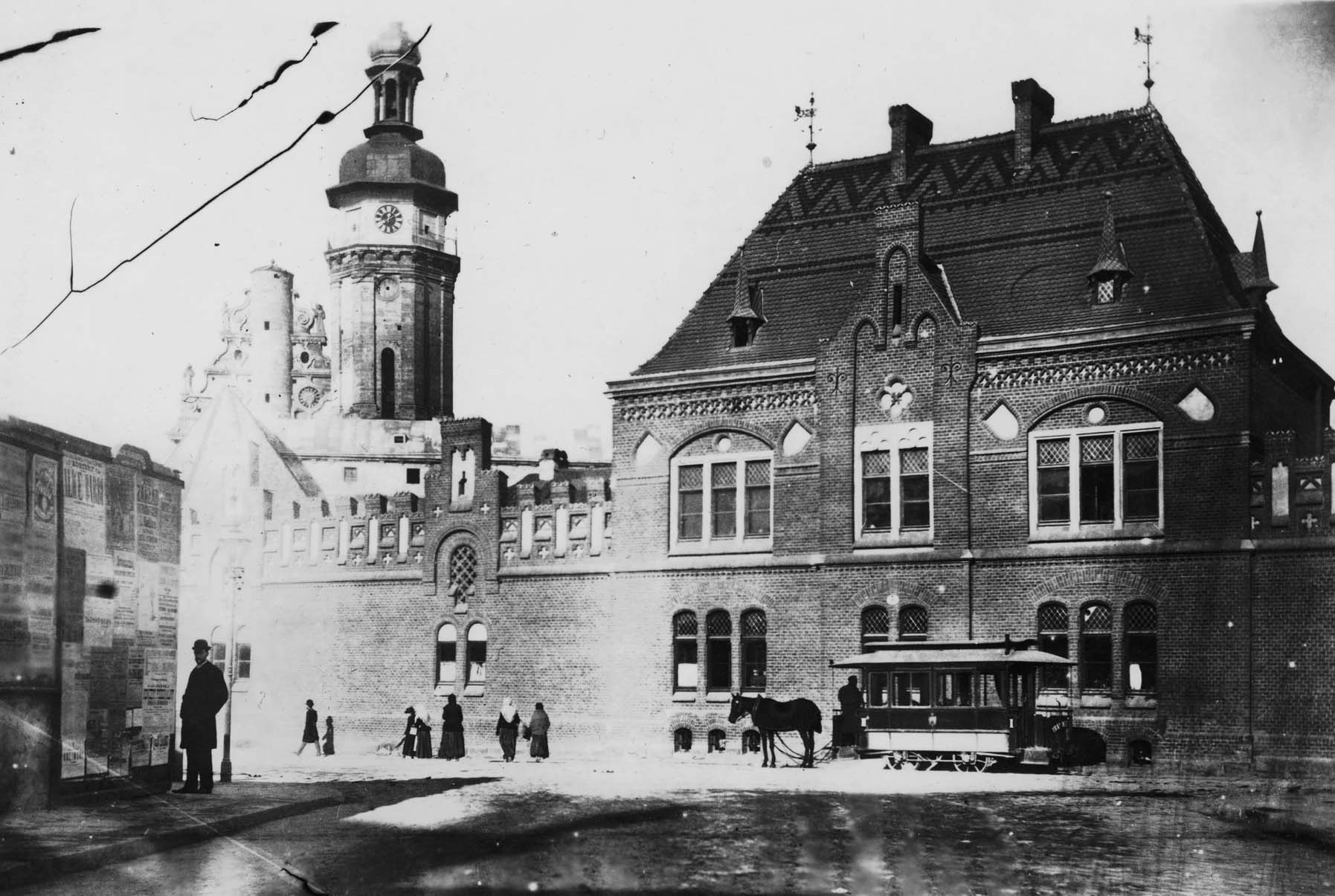 Вулиця Винниченка. Кінний трамвай, що курсував у Львові до 1907 року і будинок № 7, що був розібраний близько 1900 року.